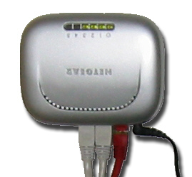 5-Port-Switch, Netgear selbst fotografiert und nachbearbeitet. p.s. Fireboy188 --SebastianWilken 22:36, 10. Mär 2005 (CET)